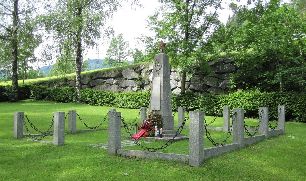 Russisches Ehrenmal auf dem Friedhof des Kriegsgefangenenlagers STALAG XVIII C am Fischbachgrund unweit der Salzach. Neben russischen Soldaten liege auch Franzosen und Angehörige anderer Nationen.